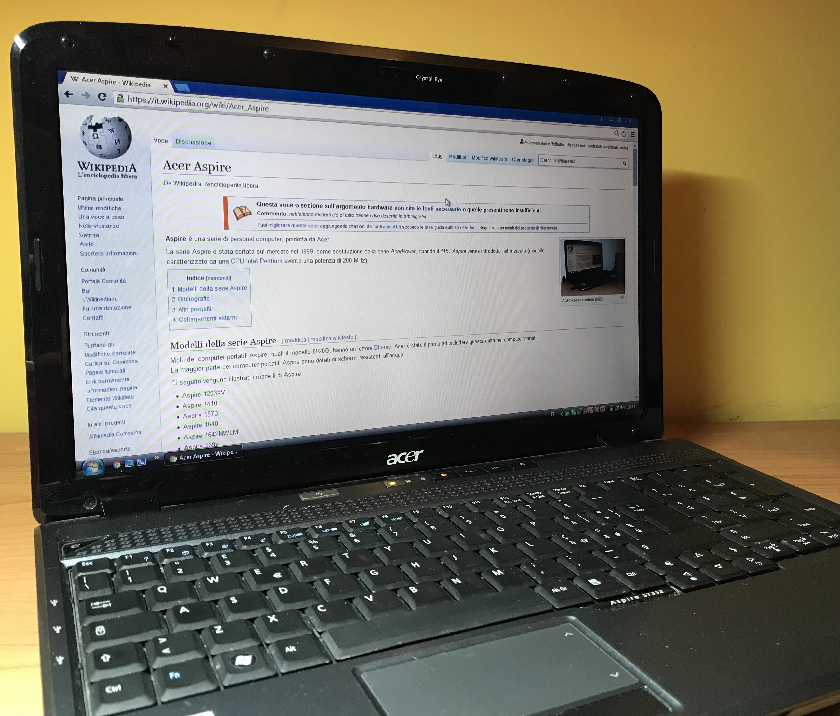 Acer Aspire 5735z con Wikipedia .